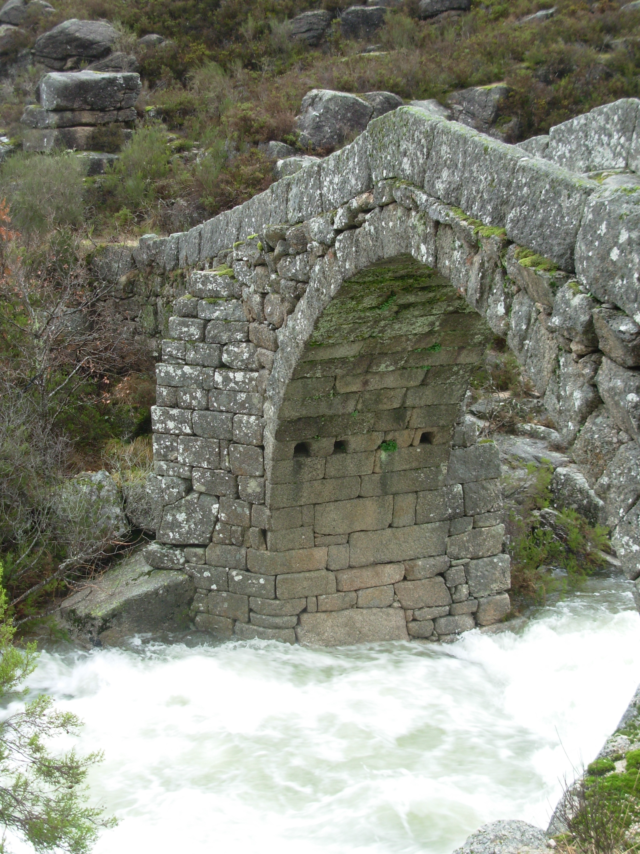 Ponte Nova da Cava da Velha, sobre o rio Laboreiro, em Castro Laboreiro, Melgaço, Portugal.